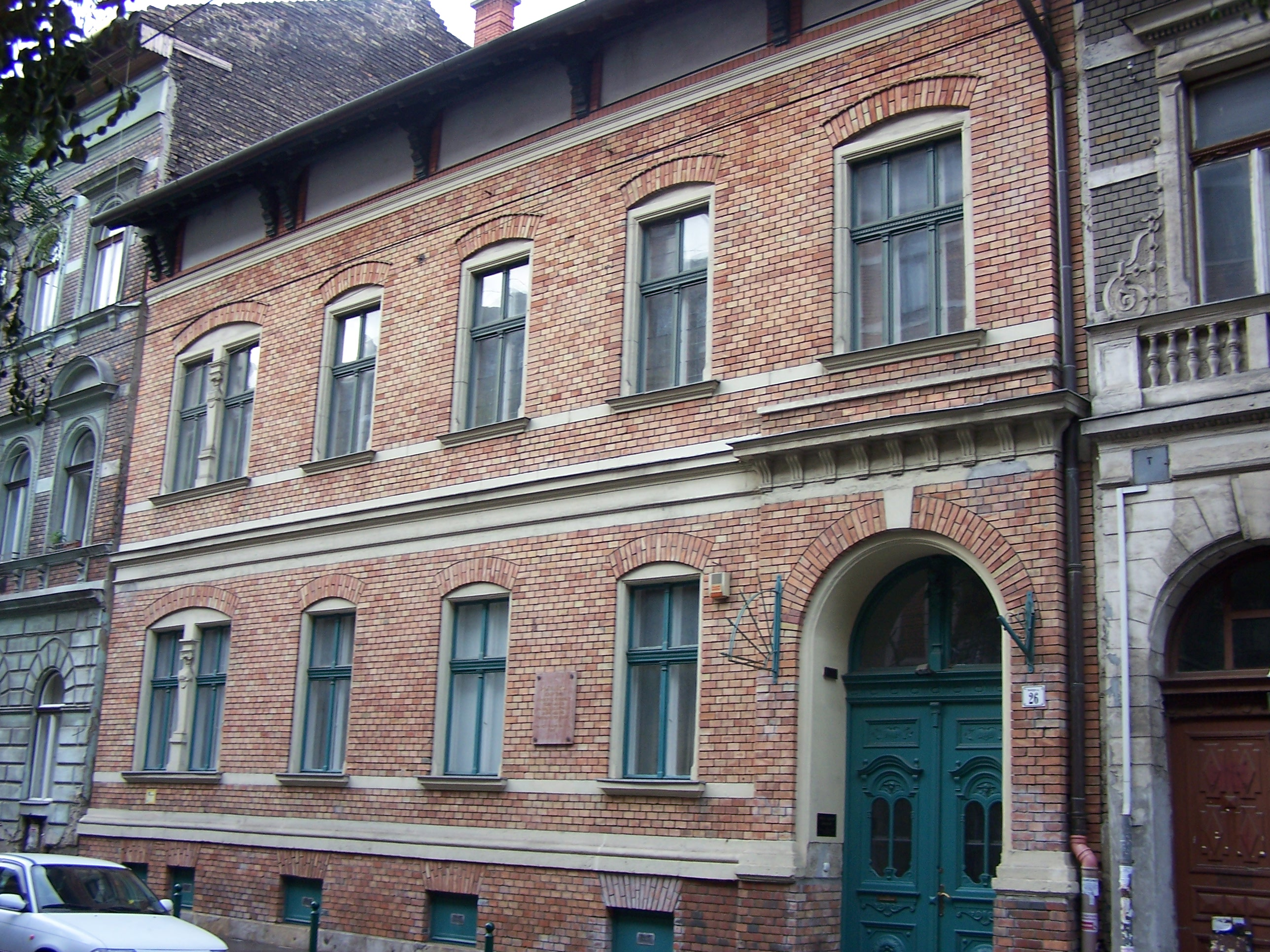 Lakóház (Budapest 7, Nefelejcs utca 26.) - Róth Miksa üvegfestőművész egykori lakása és műterme, jelenleg emlékház This is a photo of a monument in Hungary, Identifier: 850